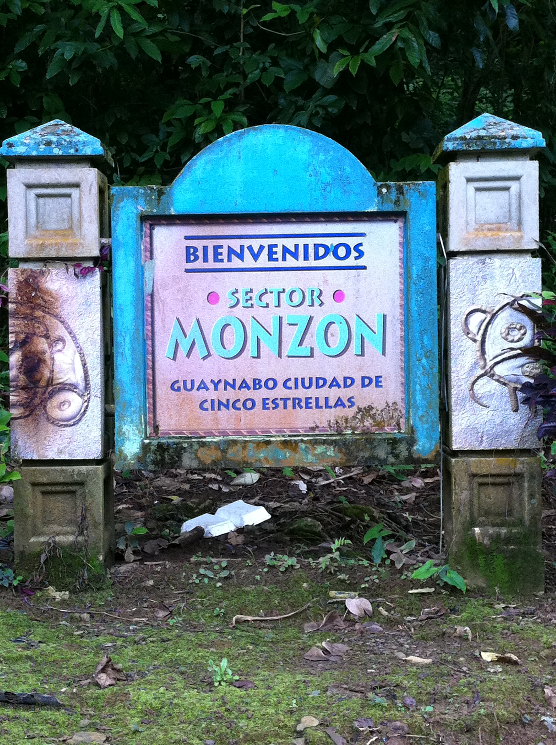 Sector Monzon